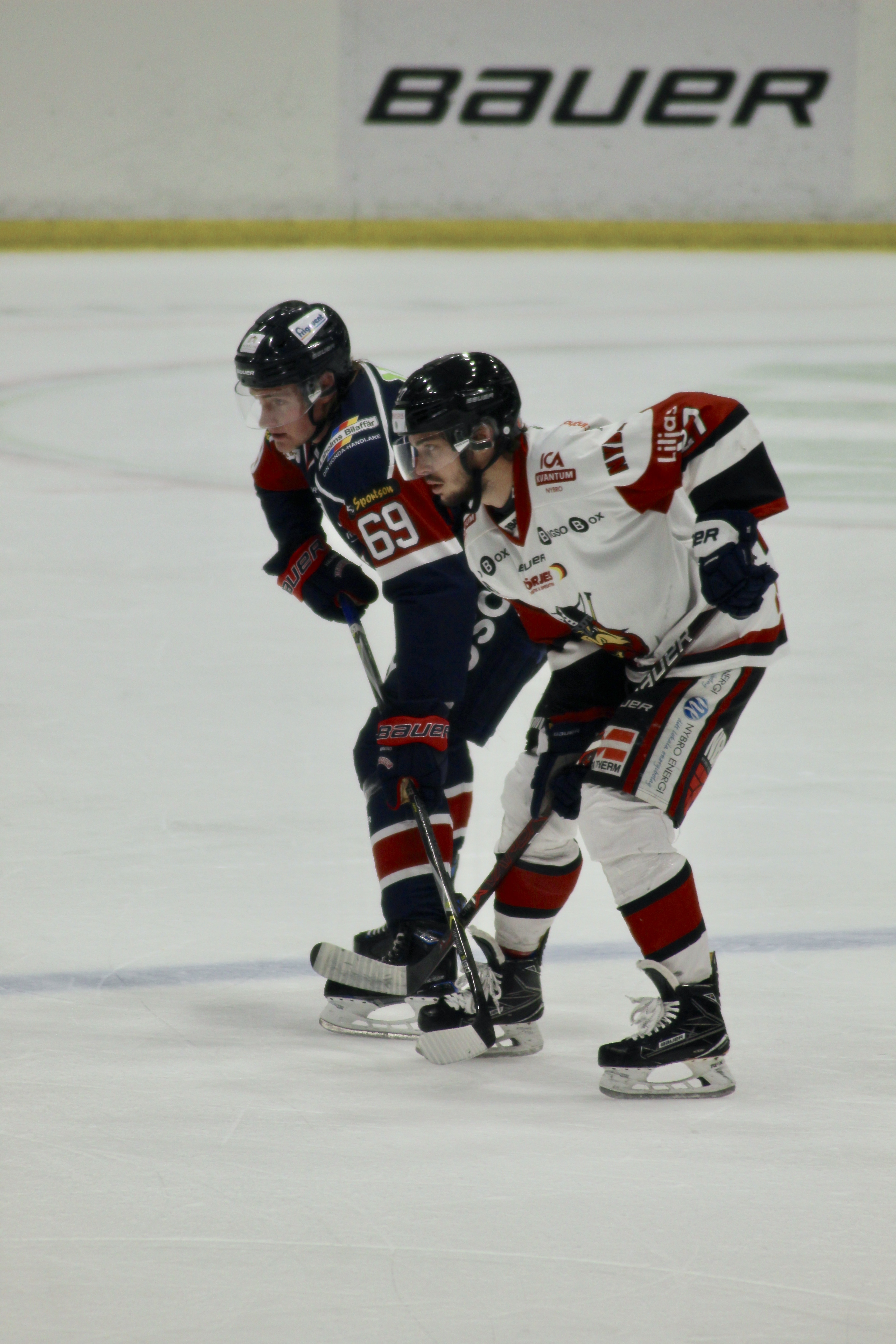 William Berg (Halmstad) och Simon Mattson (Nybro) väntar på en tekning i matchen Halmstad Hammers–Nybro Vikings 2018-10-12 i Halmstads Arena.